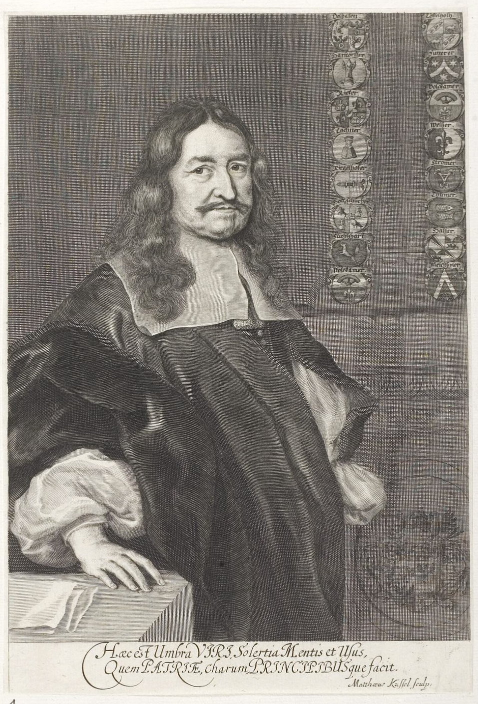 Grafik aus dem Klebeband Nr. 3 der Fürstlich Waldeckschen Hofbibliothek Arolsen Motiv: Tobias Oelhafen von Schöllenbach (1601–1666), Jurist; 1620 Studium in Tübingen, 1621 in Straßburg, 1623 in Basel; Promotion in Altdorf zum Doktor beider Rechte, Konsulent und Assessor am Nürnberger Stadtgericht; 1627 Genannter des Größeren Rates; Gesandter Nürnbergs bei Reichstagen und -städten; Vertreter Nürnbergs beim Friedenskongreß in Osnabrück; 1652 Assessor am reichsstädtischen Appellhof, kaiserlicher Pfalzgraf und Prokanzler der Universität Altdorf GND: 118861646